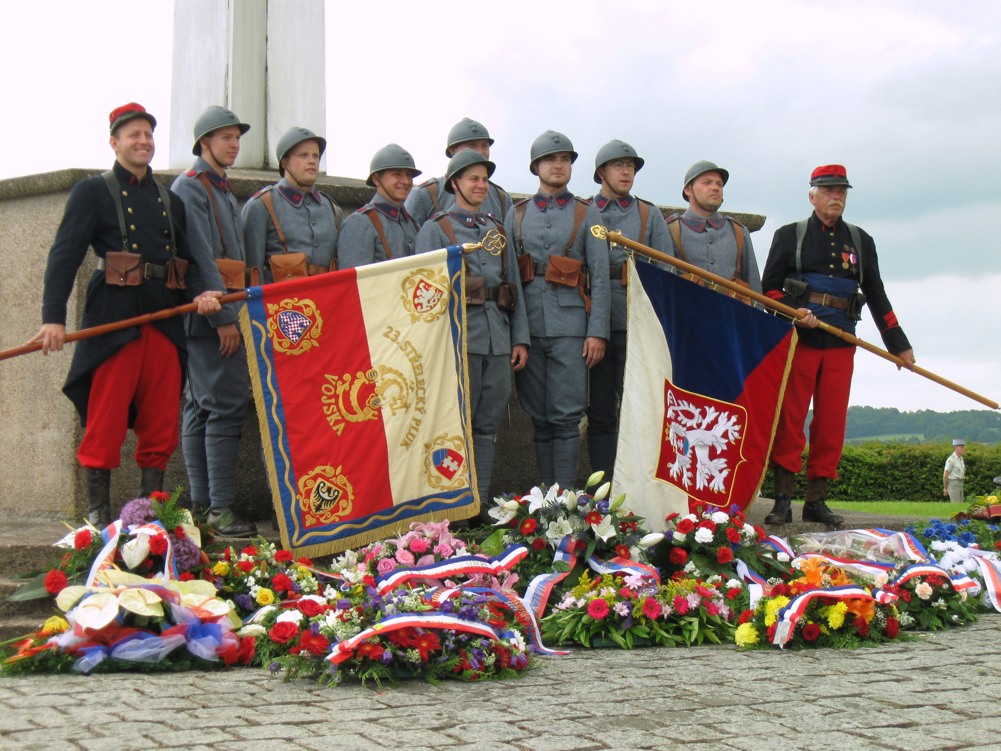 Českoslovenští legionáři u památníku v Darney, vzpomínkový pietní akt u památníku dne 30. června 2013 s jednotkou v uniformách ČS legionářů ve Francii